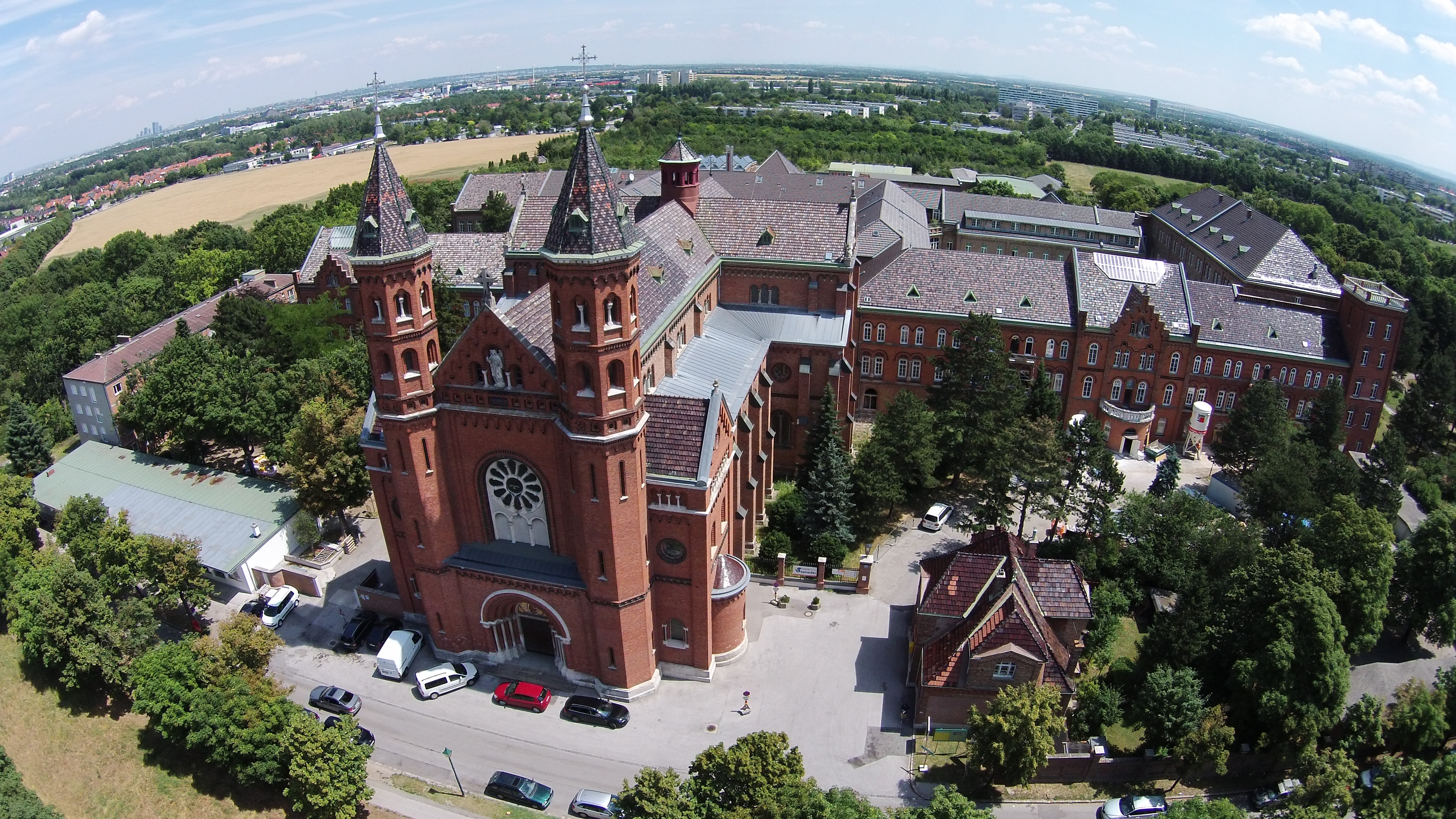 Missionshaus St. Gabriel in Maria Enzersdorf, Niederösterreich